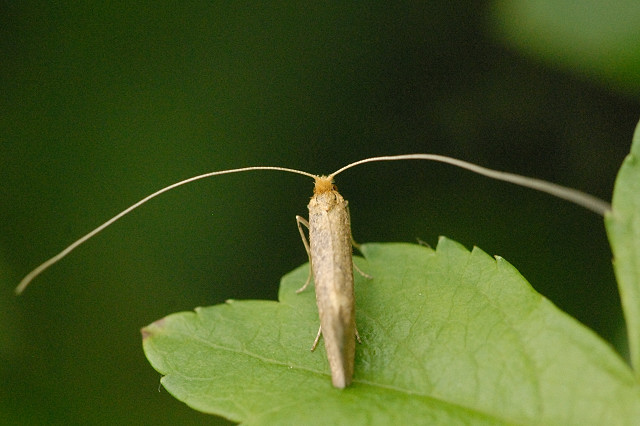 Nematopogon metaxella from Commanster, Belgian High Ardennes .